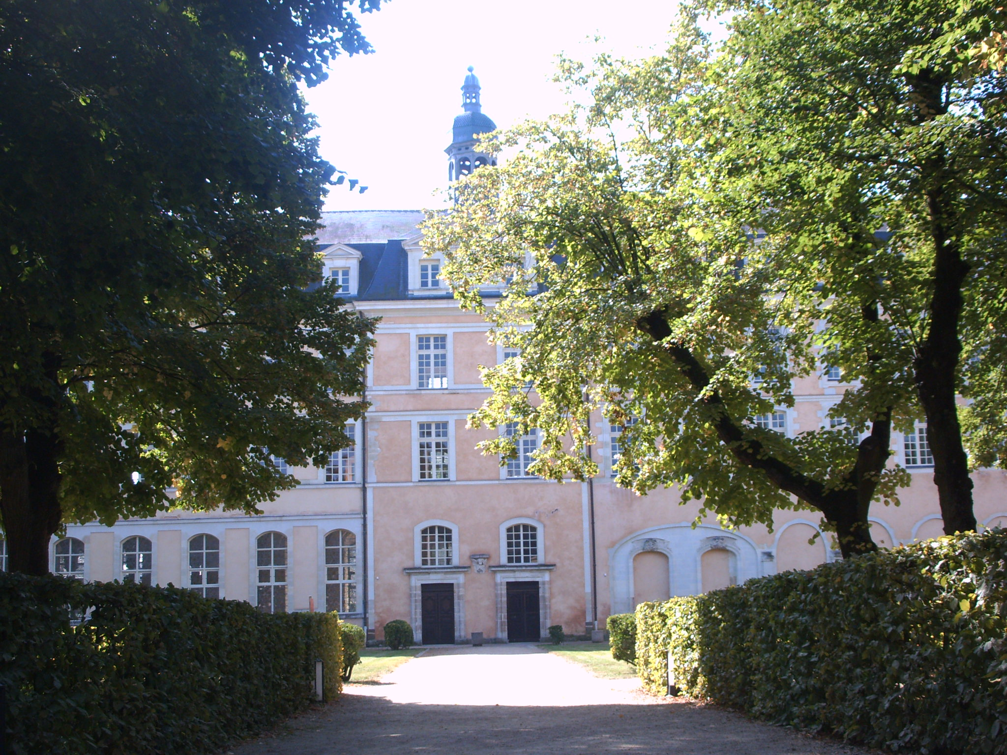 Façade nord